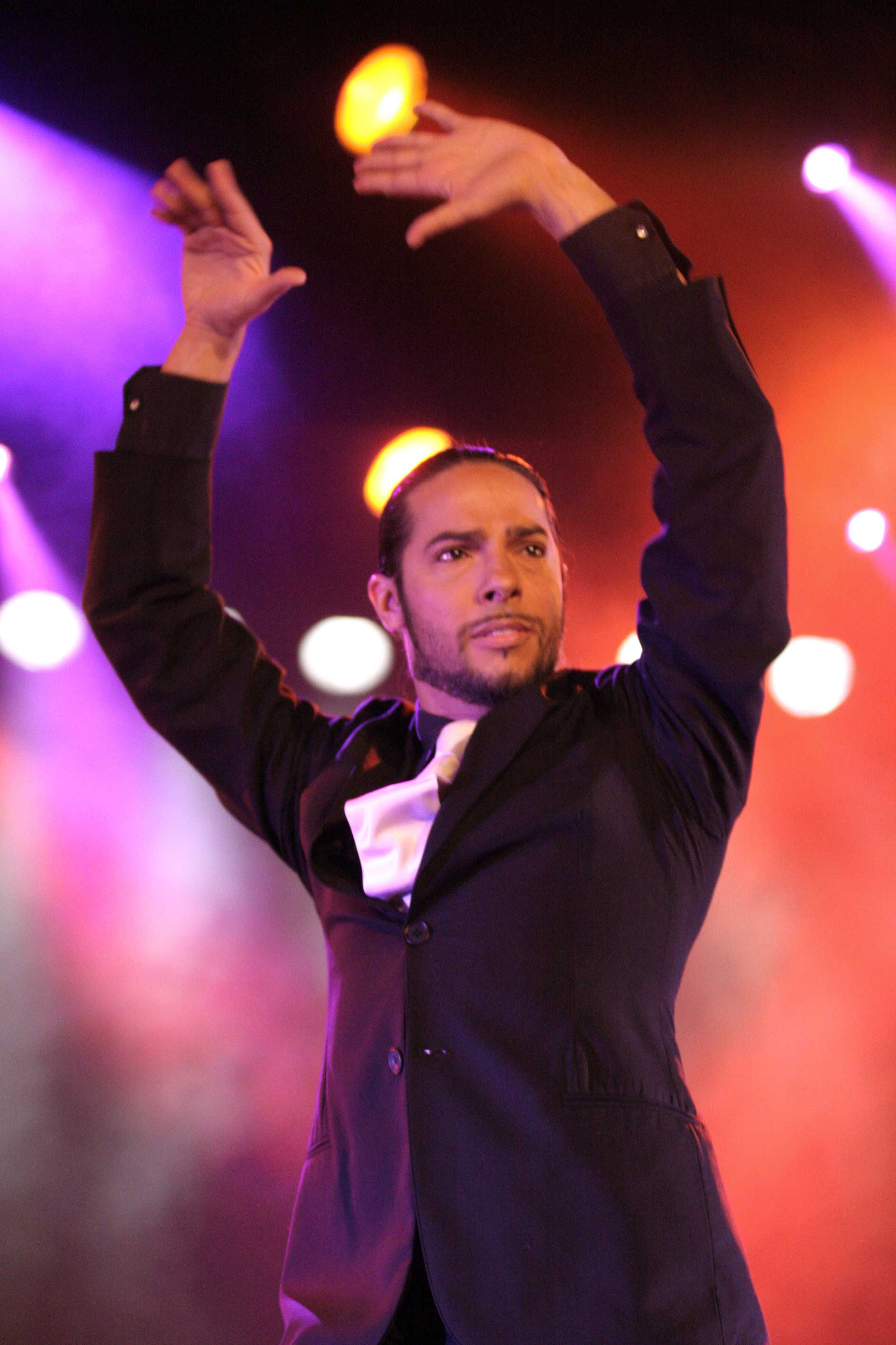 Spanish flamenco dancer Joaquín_Cortés.